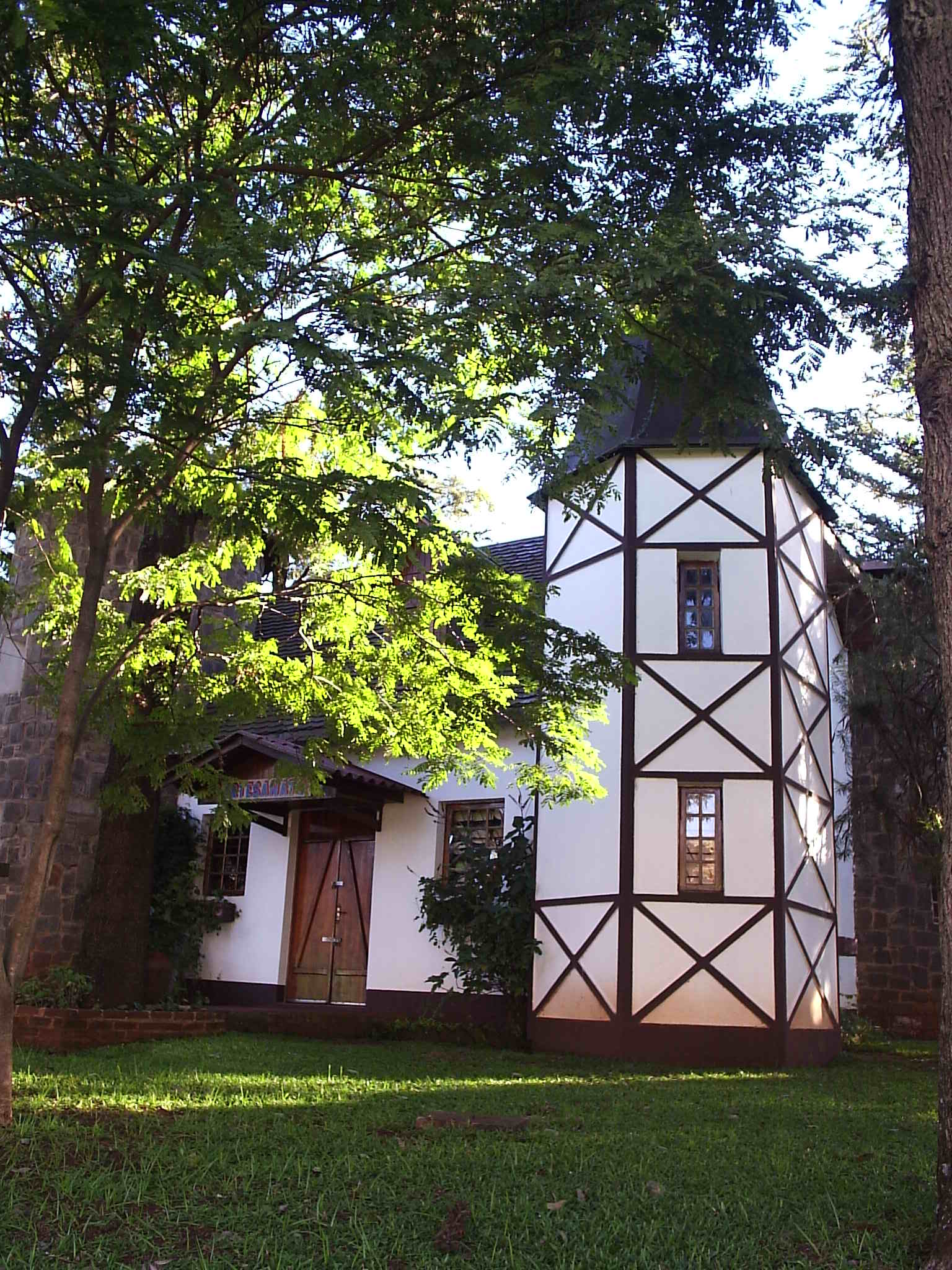 Kaufhaus, um prédio em estilo típico alemão, onde há mostra de artesanato. Panambi, Rio Grande do Sul.